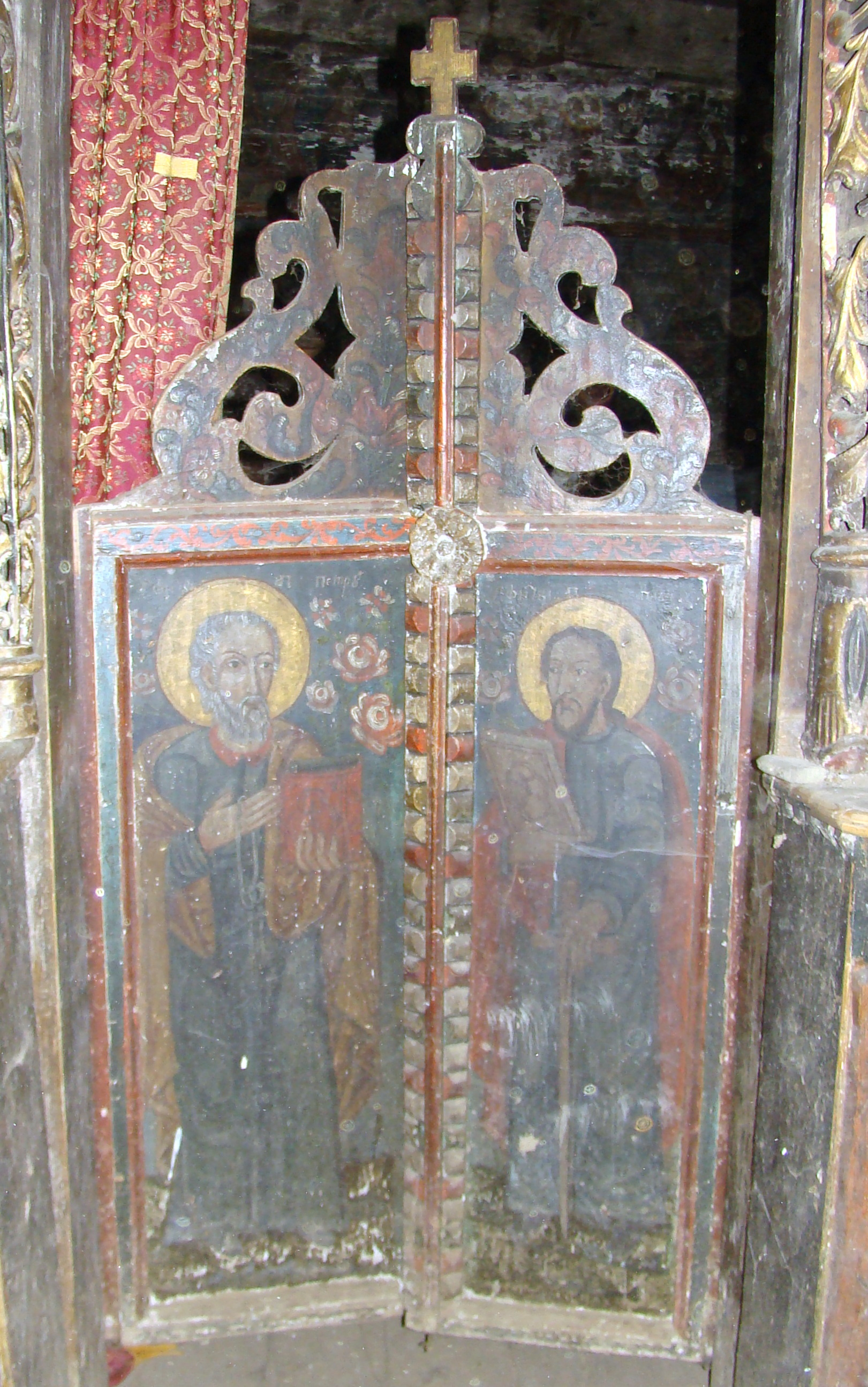 Biserica de lemn „Sf. Vasile cel Mare”, sat Dragu; comuna Dragu, judeţul Sălaj